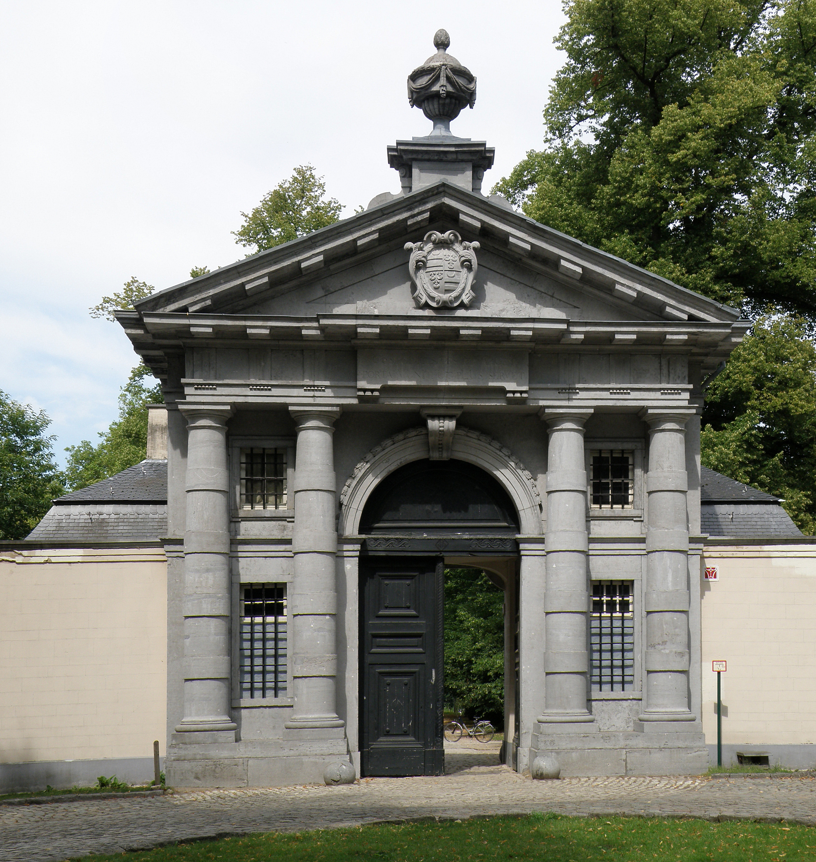 Sint-Katelijne-Waver (prov. Antwerpen, België). Abdij van Rozendaal (domein Roosendael), Poorthuis (inkompoort).